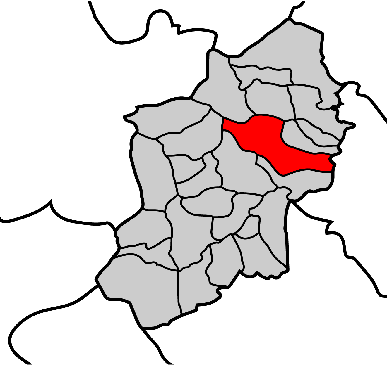 Mapa de la parroquia de Vilachá de Cancelada ayuntamiento de Becerreá